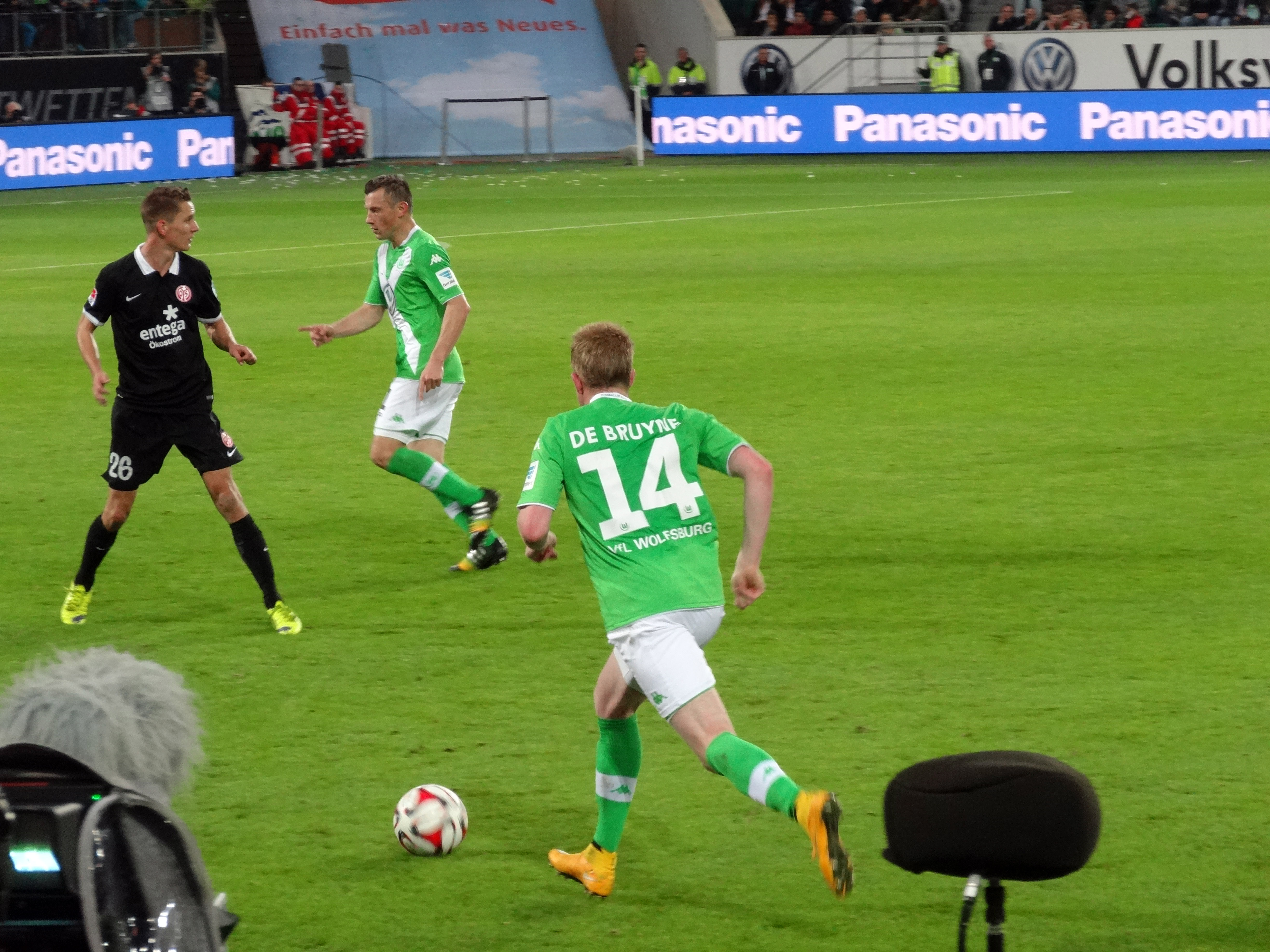 VfL Wolfsburg - Mainz 05 3:0 26.10.2014, Volkswagen Arena Deutsche Bundesliga - De Bruyne